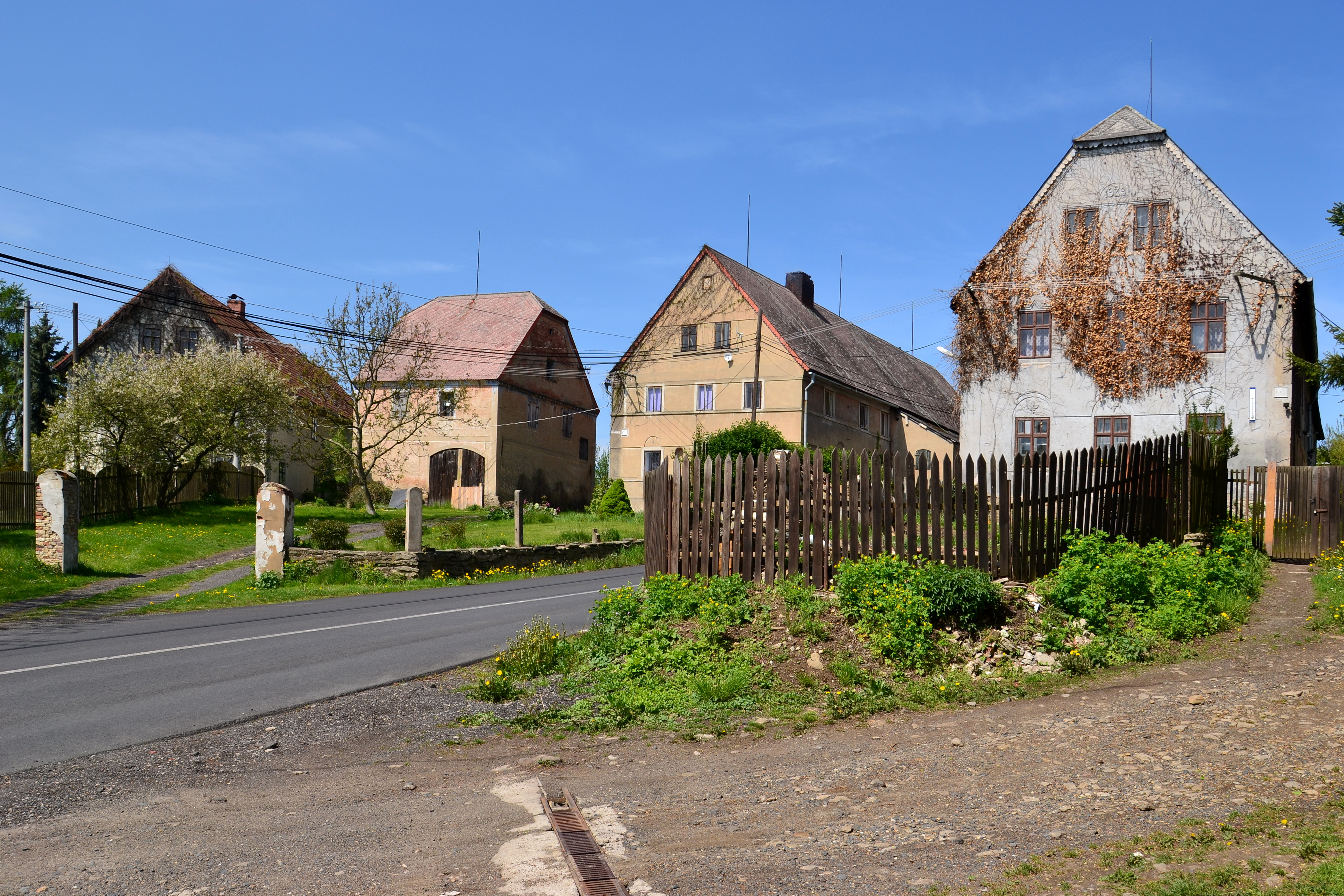 Šerchov – domy v horní části návsi